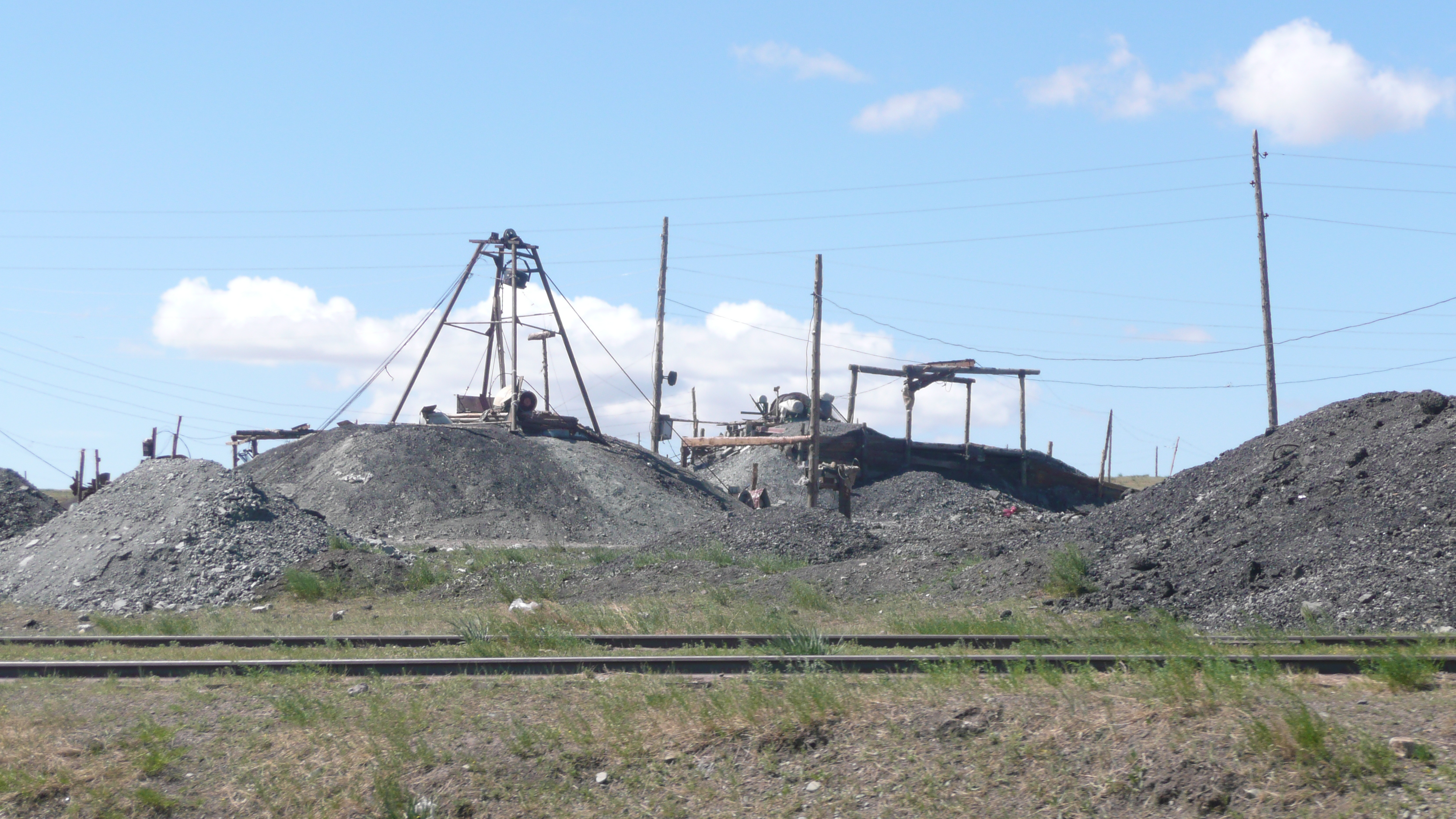 Private Kohlegewinnung in der Bergbaustadt Nalaikh unweit von Ulan Bator